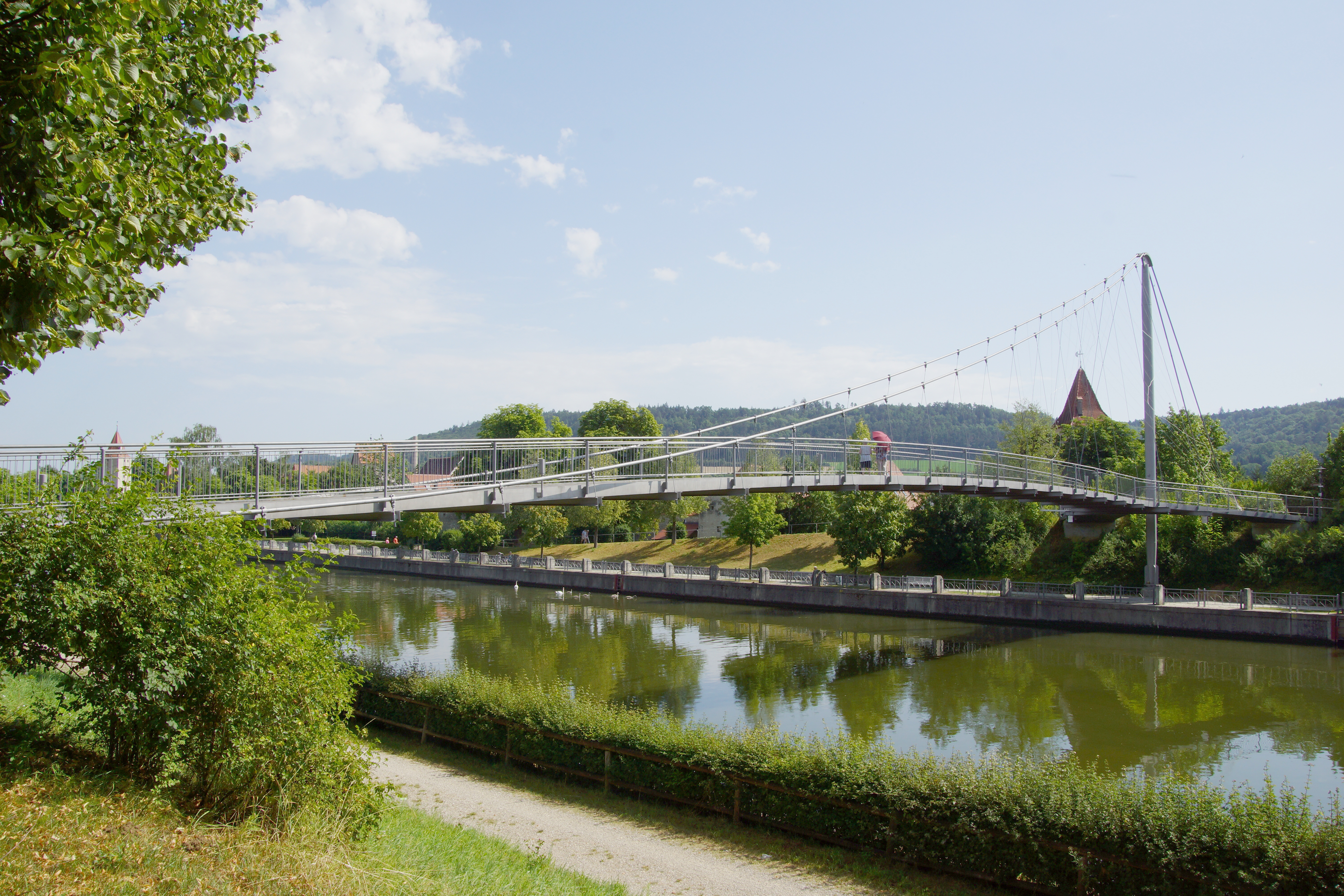 Die kleine Stadt Berching in der Oberpfalz